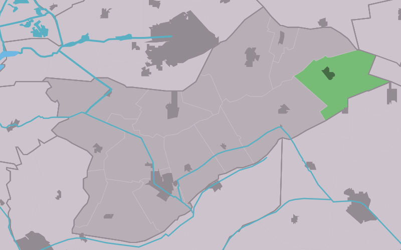 Kaartsje fan himrik fan Bakkefean